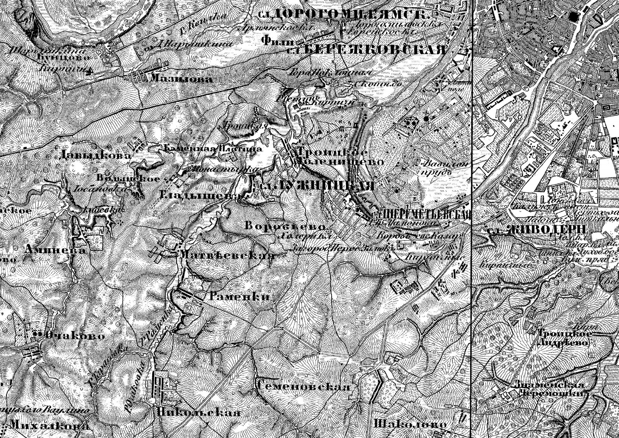 Юго-западная часть Москвы и Московской области